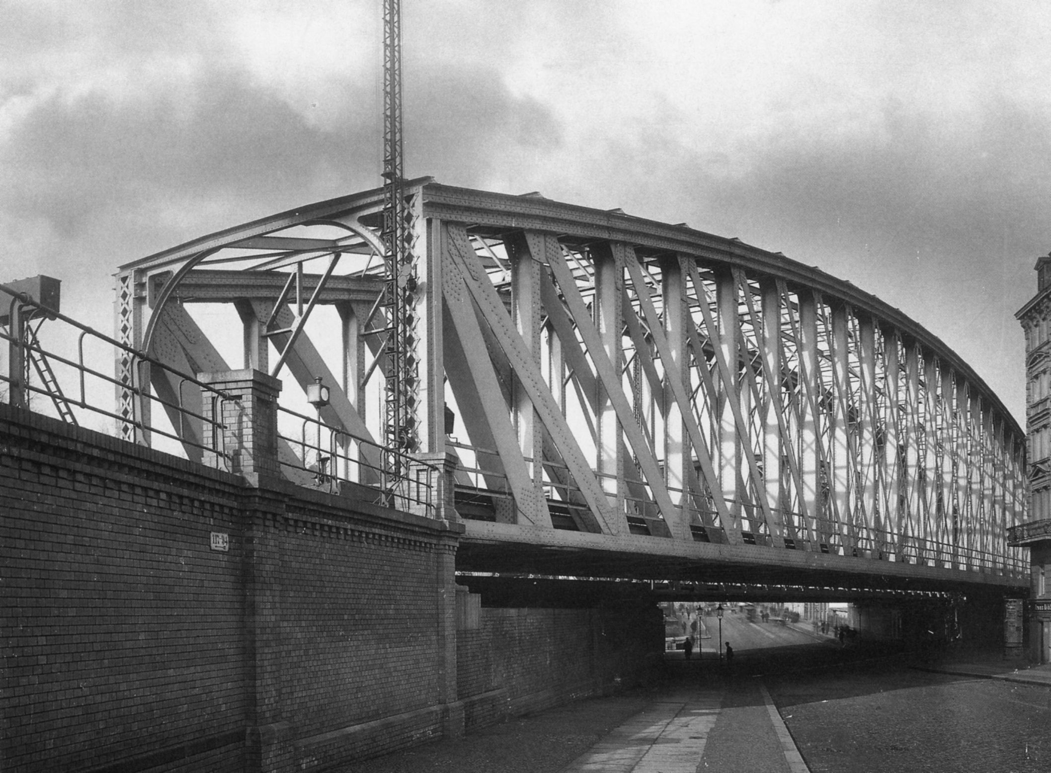 Brücke der Stettiner Bahn über die Liesenstraße